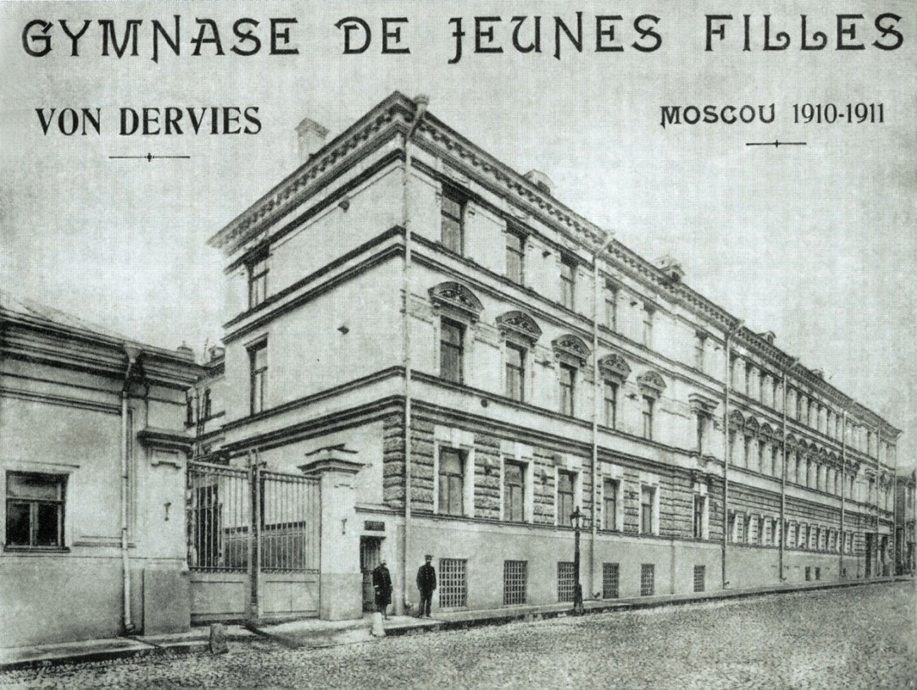 Гимназия имени Варвары фон Дервиз. Москва, Гороховский переулок, 10 (сохранилась и так и действует как школа).